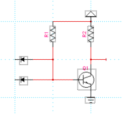 DTL 낸드 게이트의 회로도